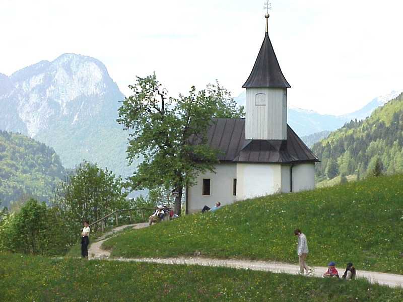 Antoniuskapelle im Kaisertal, im Hintergrund der Pendling. This media shows the remarkable cultural object in the Austrian state of Tyrol listed by the Tyrolean Art Cadastre with the ID 2620. (on tirisMaps, pdf, more images on Commons, Wikidata)